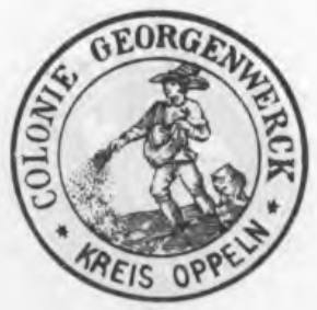 Altes Siegel der Kolonie Georgenwerk im Kreis Oppeln.